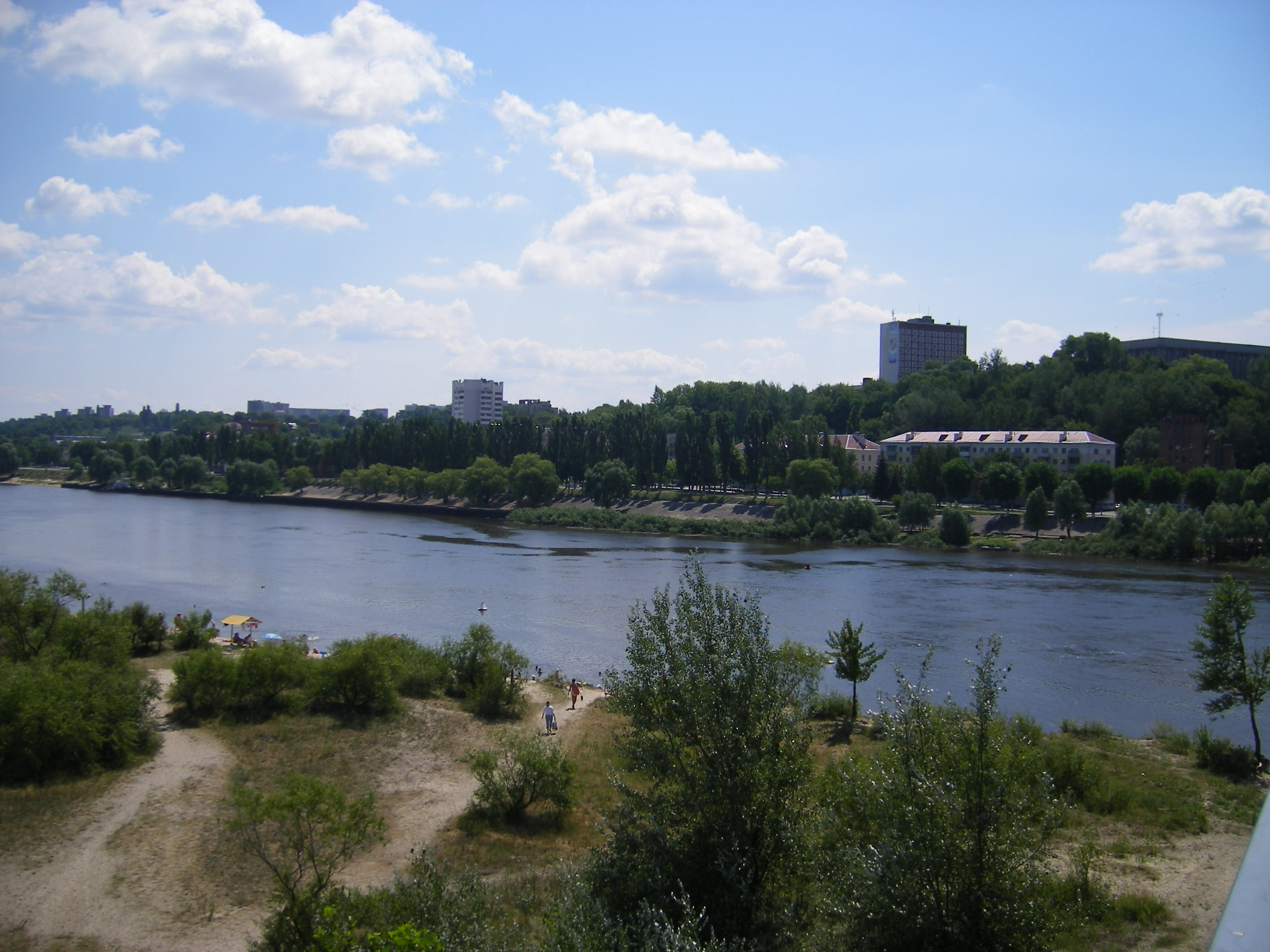 Mazyr, Pripyat´river